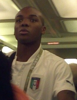 Angelo Ogbonna con la tuta della nazionale italiana